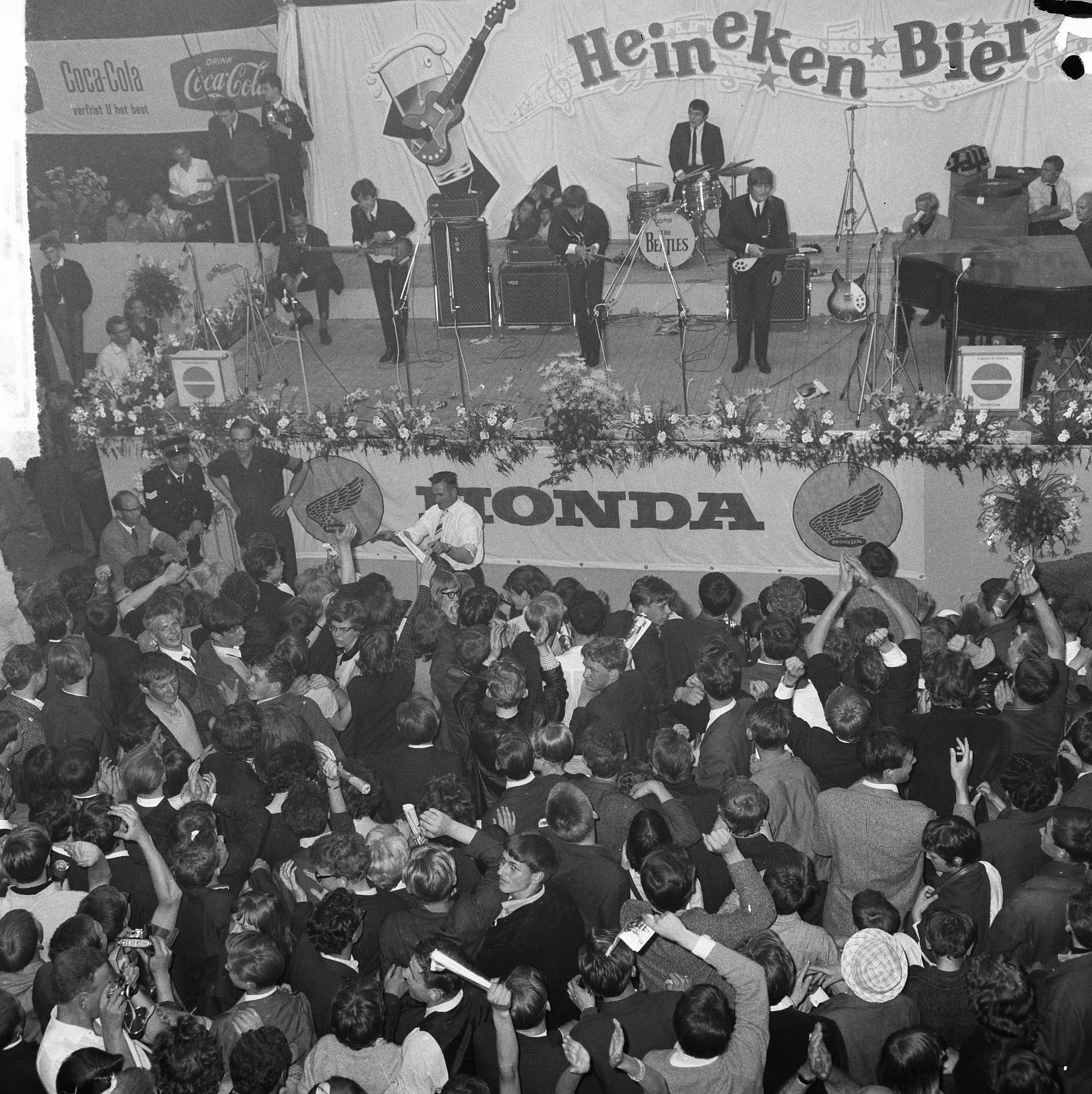 Collectie / Archief : Fotocollectie Anefo Reportage / Serie : [ onbekend ] Beschrijving : Beatles in ons land, hun optreden in de veilingshal te Blokker, publiek Datum : 7 juni 1964 Locatie : Blokker Trefwoorden : Optredens, publiek, veilinghallen Instellingsnaam : Beatles Fotograaf : Nijs, Jac. de / Anefo Auteursrechthebbende : Nationaal Archief Materiaalsoort : Negatief (zwart/wit) Nummer archiefinventaris : bekijk toegang 2.24.01.03 Bestanddeelnummer : 916-5170